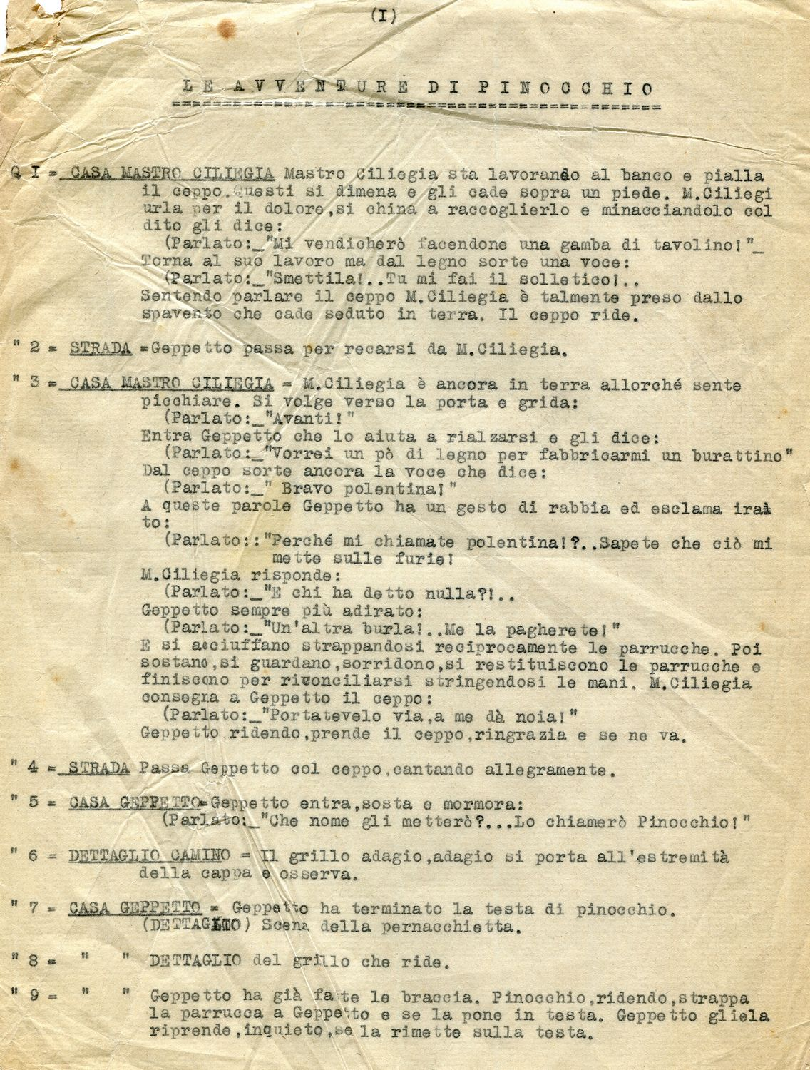 Sceneggiatura originale del cartone animato "Le avventure di Pinocchio" del 1936